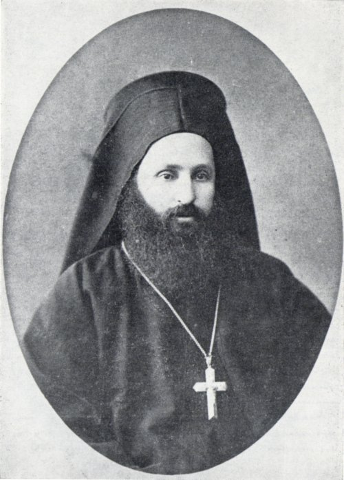 Методий (Тодор) Кусев.